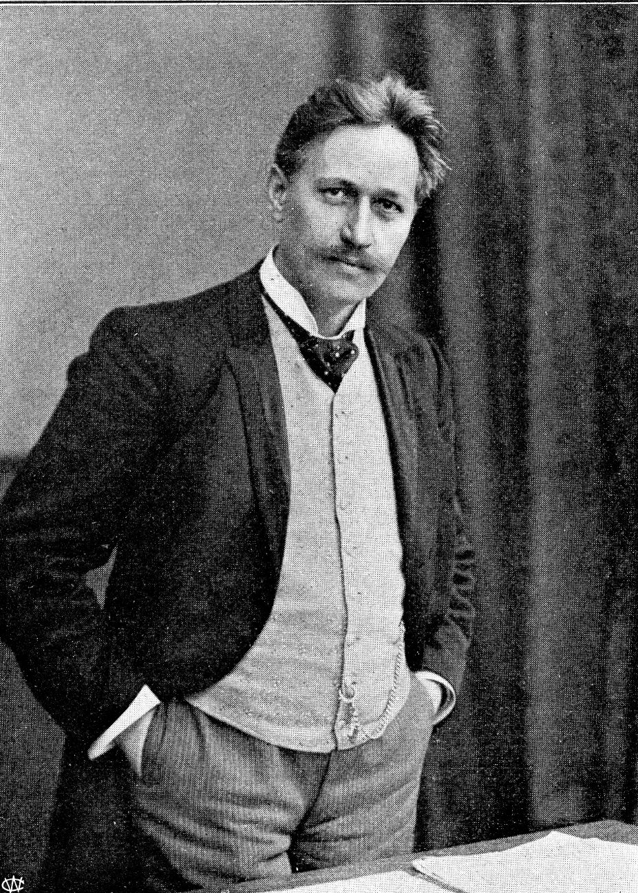 Gustav Wohlgemuth (um 1907, Fotografie von Georg Brokesch) Datierung: 1907